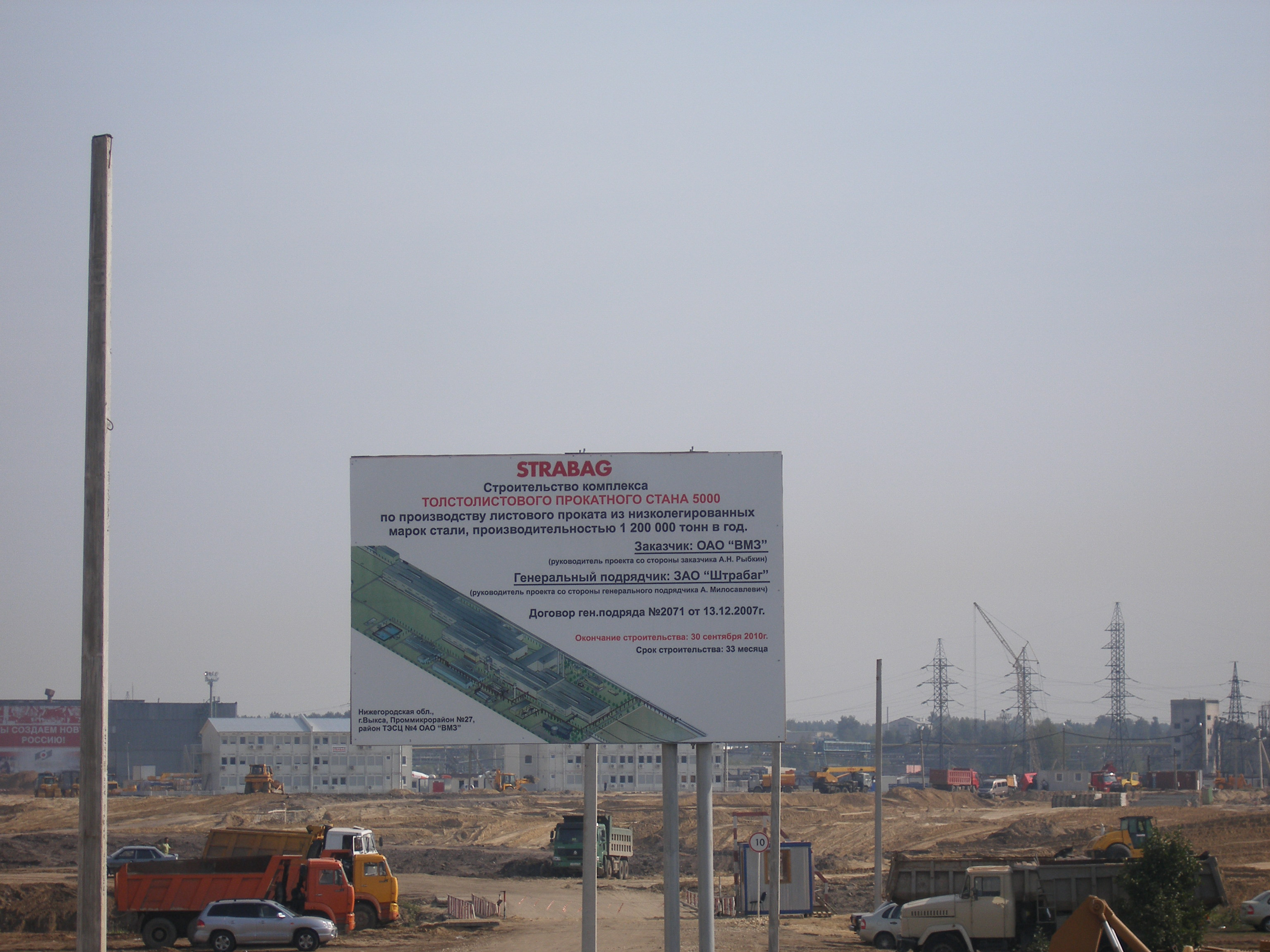 Стан 500 г.Выкса